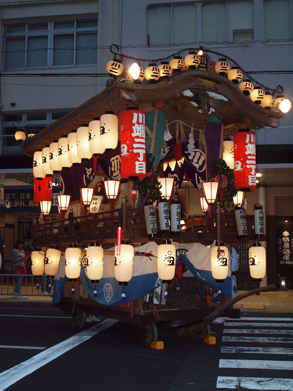 聖大祭屋台（川端二丁目・ライトアップ・前景・鳥取市本通りにて）